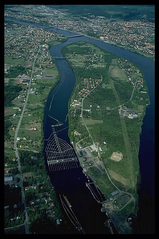 Bilden troligen från slutet av 1970-talet.; Miljöer; Stadsmiljö